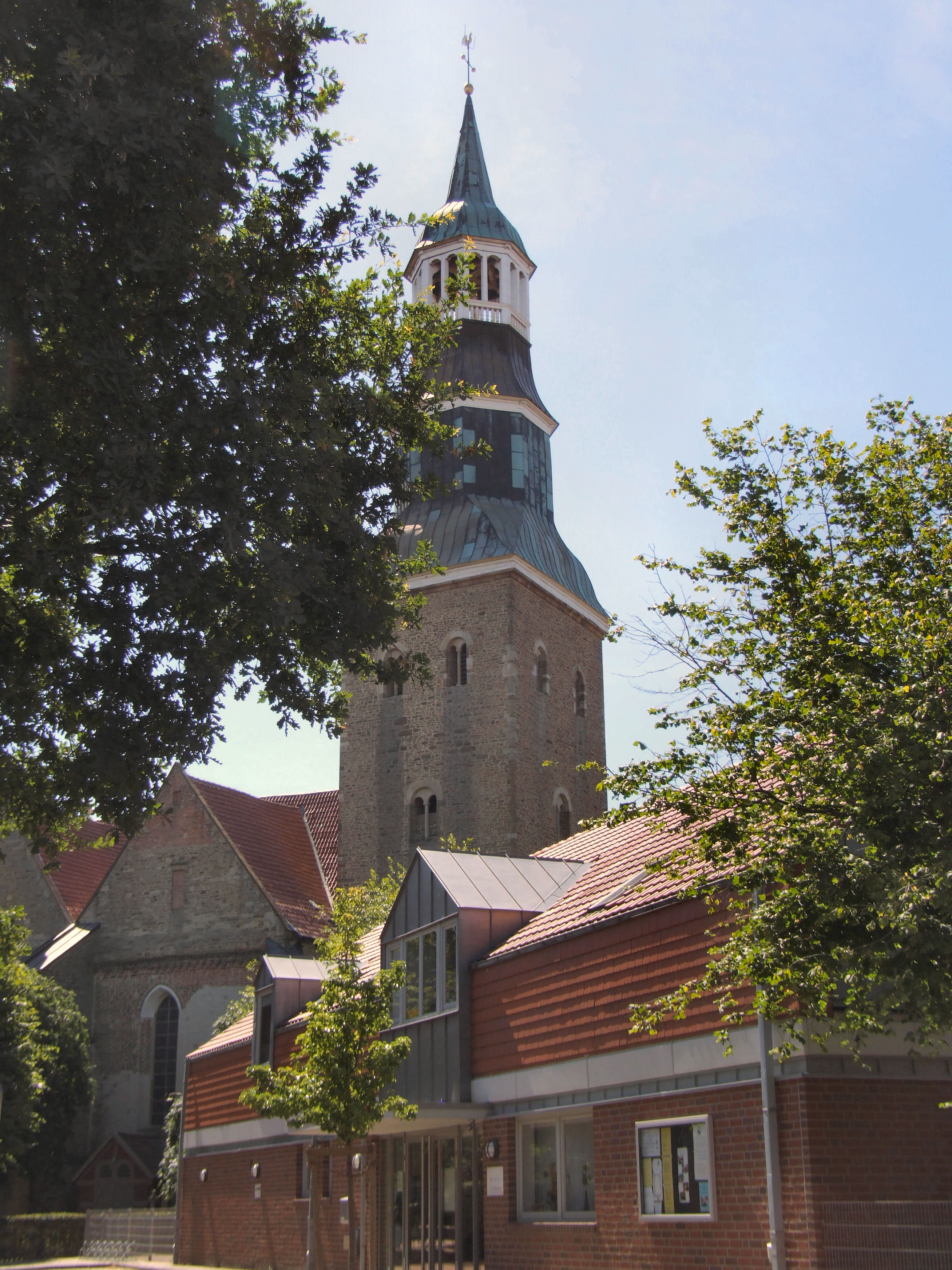 St.-Sylvester Kirche (evang.), Quakenbrück